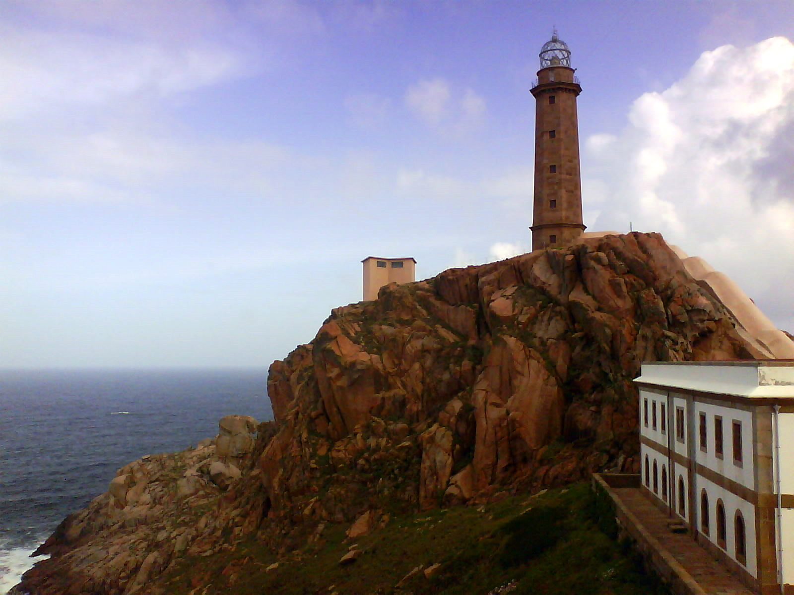 Cabo Vilán, parroquia de San Xurxo de Camariñas, A Coruña, Galiza'534751755_e422ad9936_b.jpg'